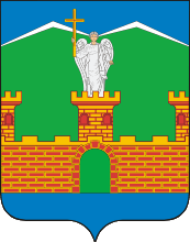 Escudo de Labinsk, krai de Krasnodar, Rusia.